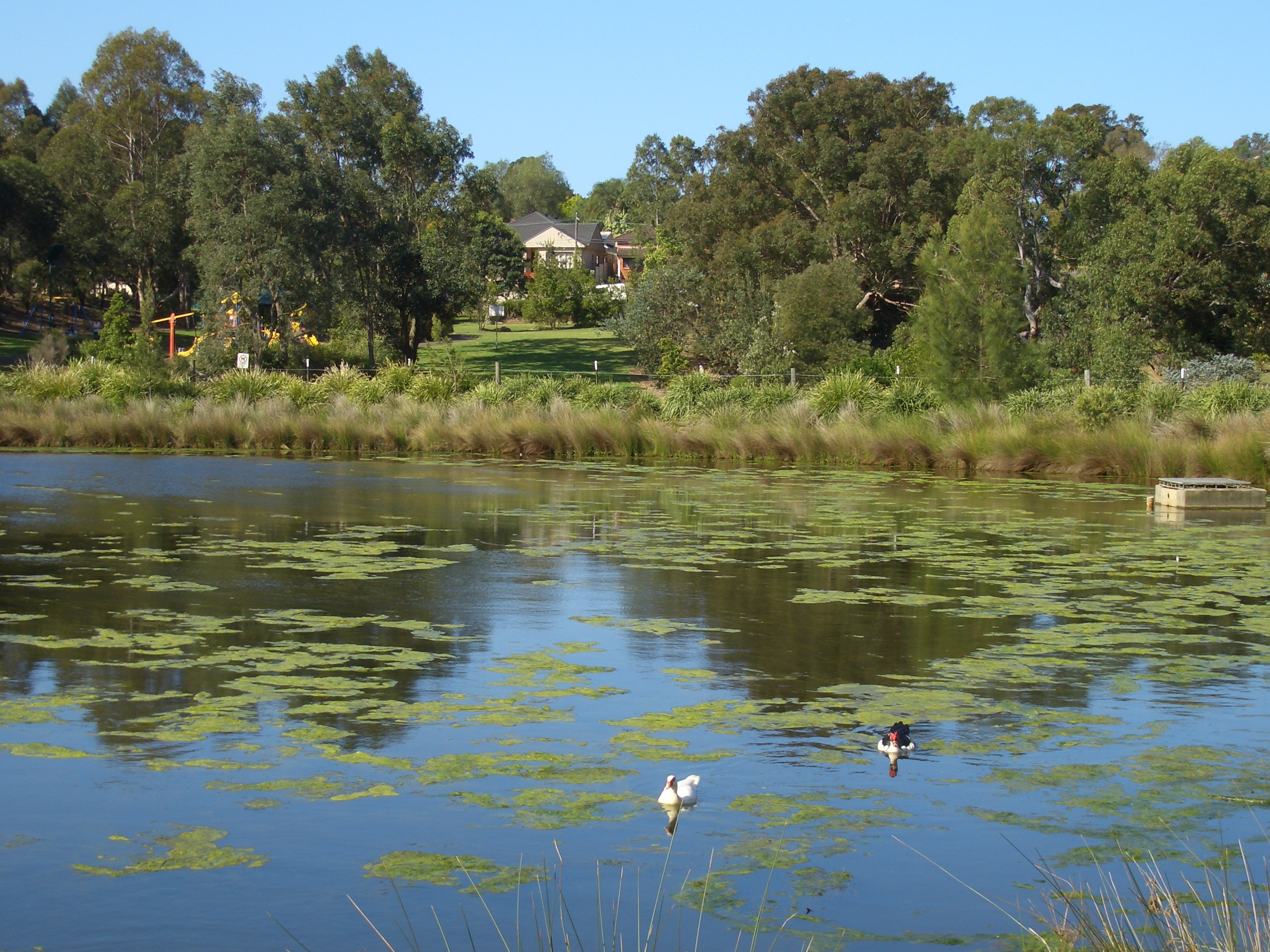 Hurstville Grove